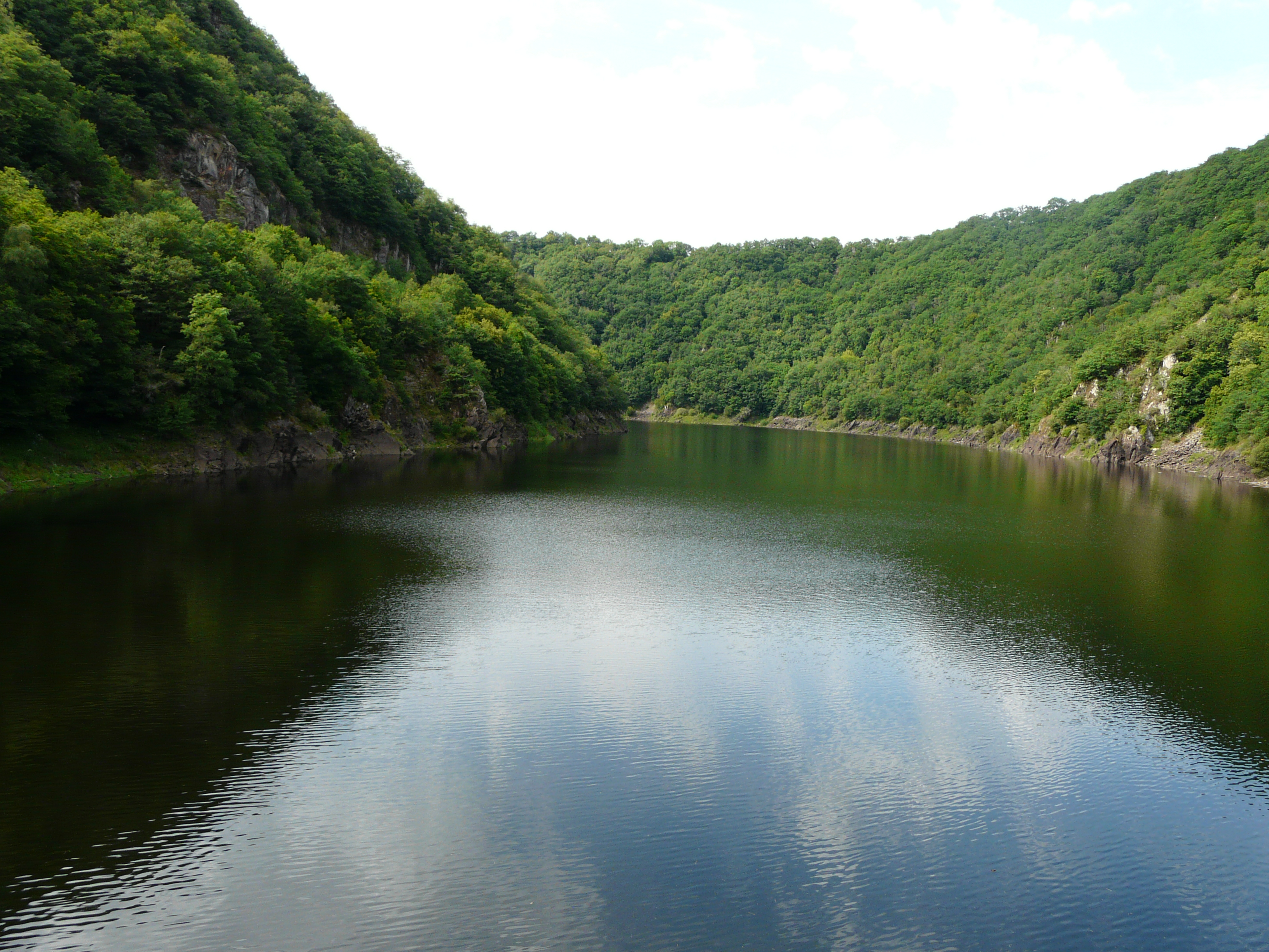 La retenue de la Dordogne en amont du barrage de Marèges, entre Liginiac (Corrèze) à gauche et Saint-Pierre (Cantal) à droite.